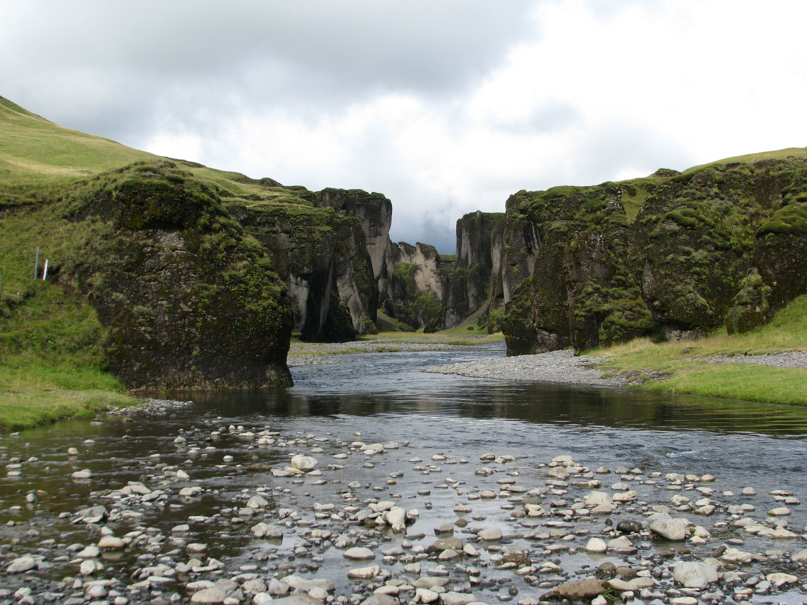 Fjaðrárgljúfur, IJsland